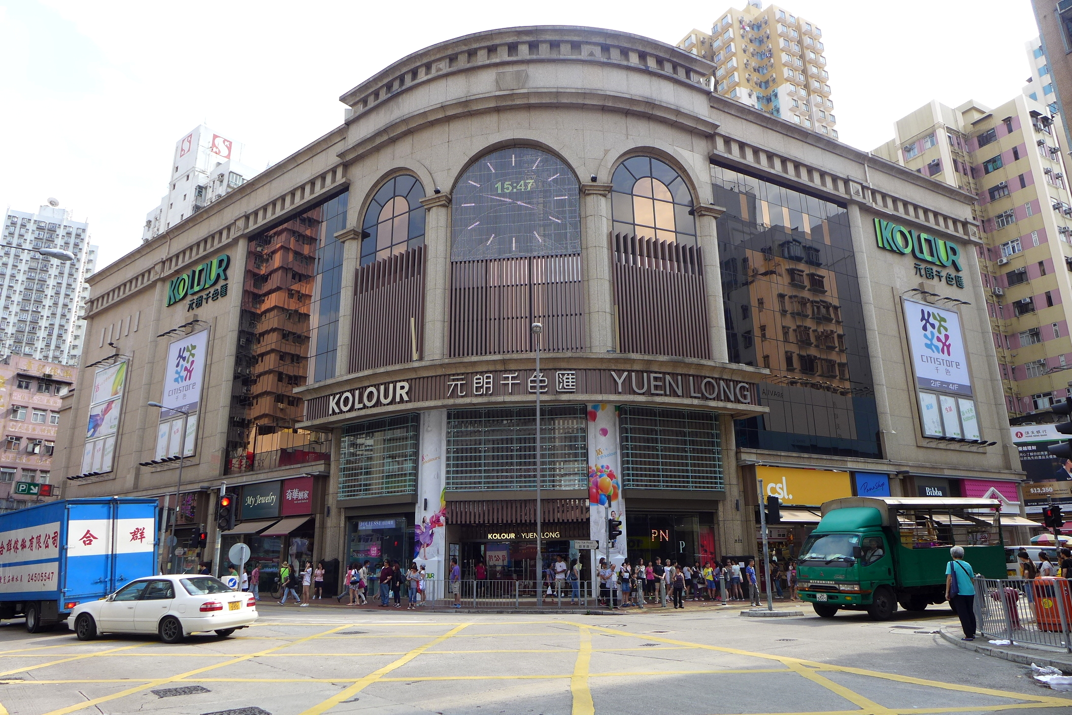 KOLOUR Yuen Long